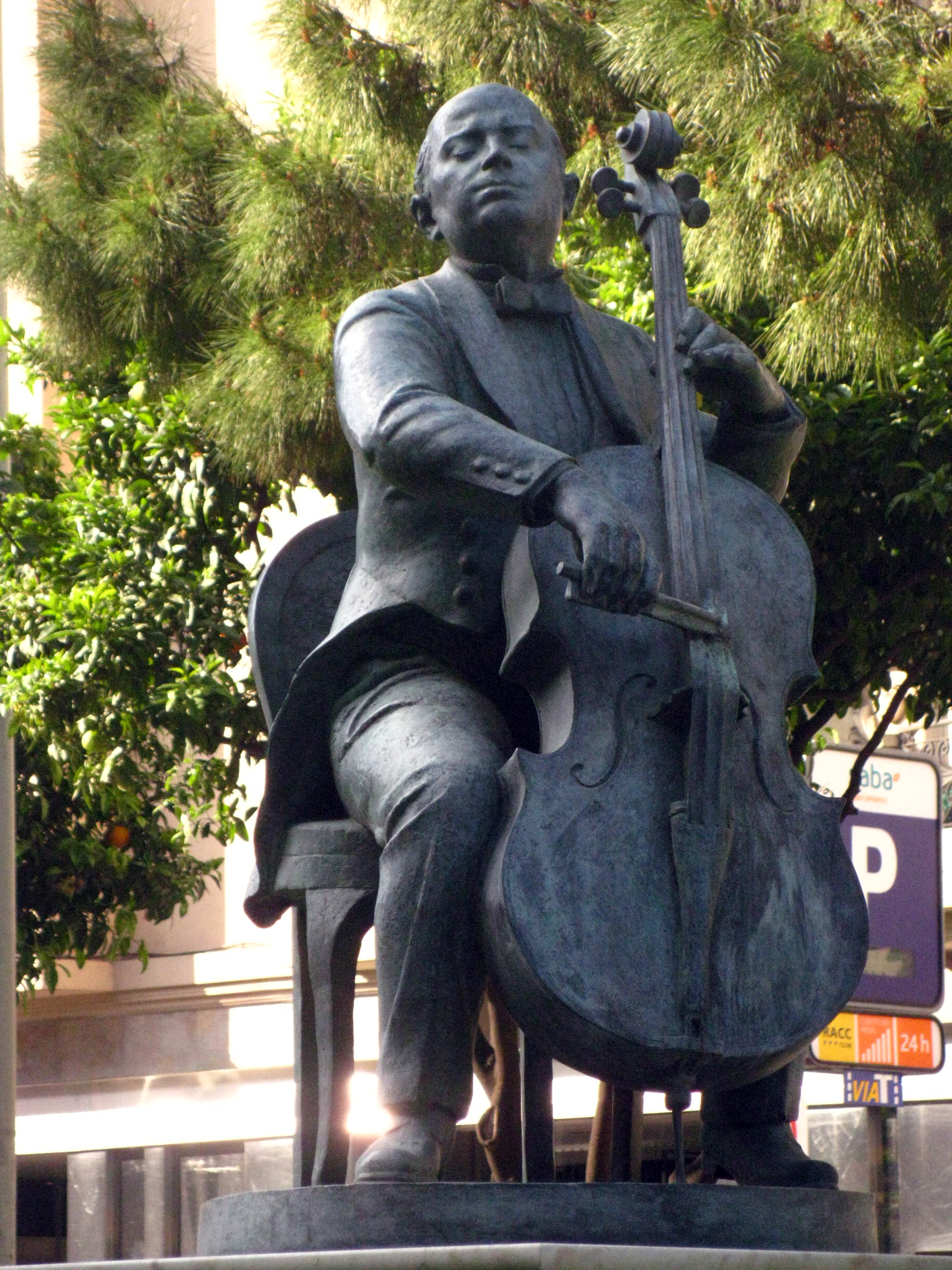 A Pau Casals (Josep Viladomat). Av. Pau Casals (Barcelona)